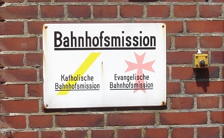 Schild